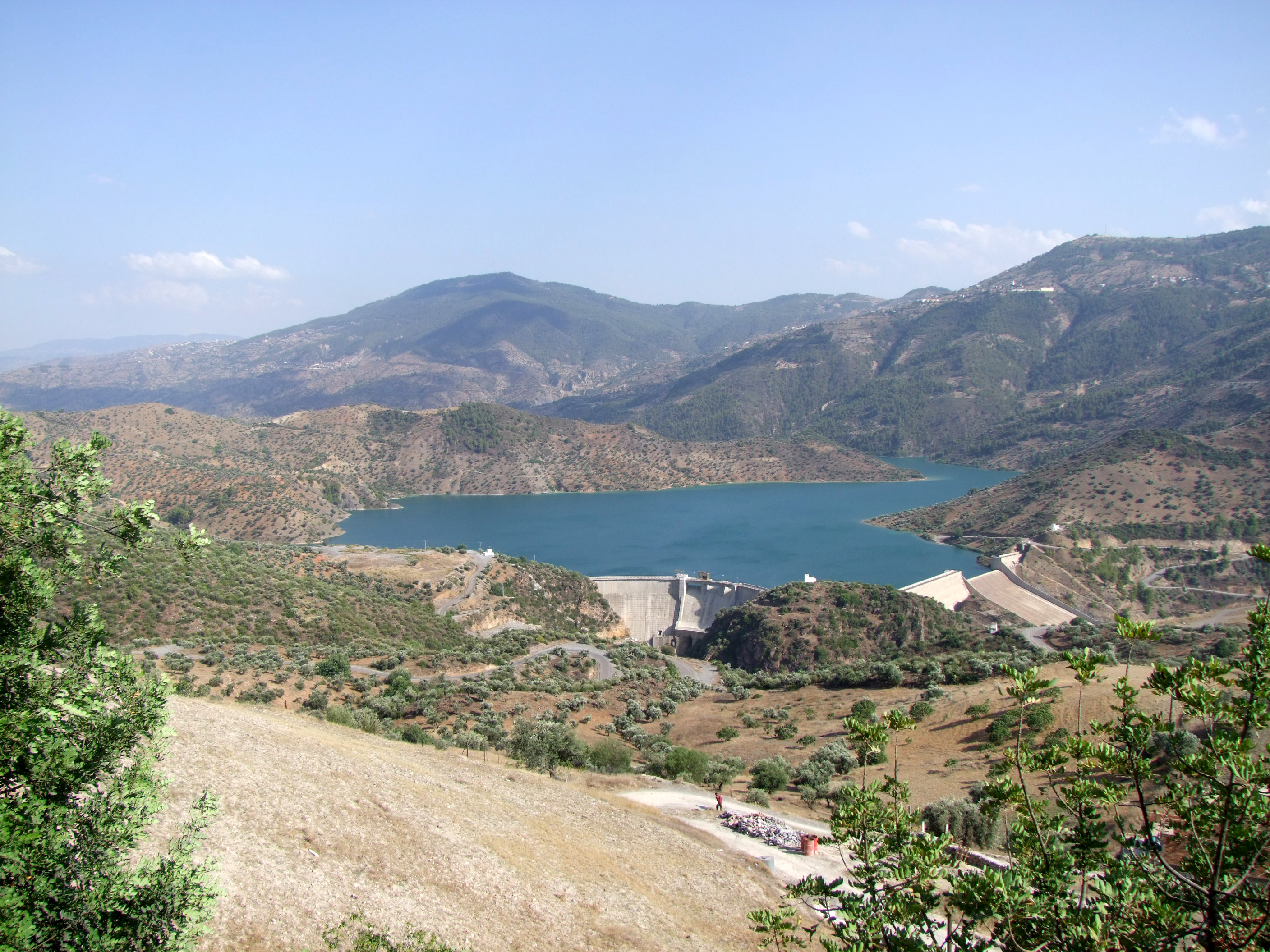 Barrage Tichy-Haf